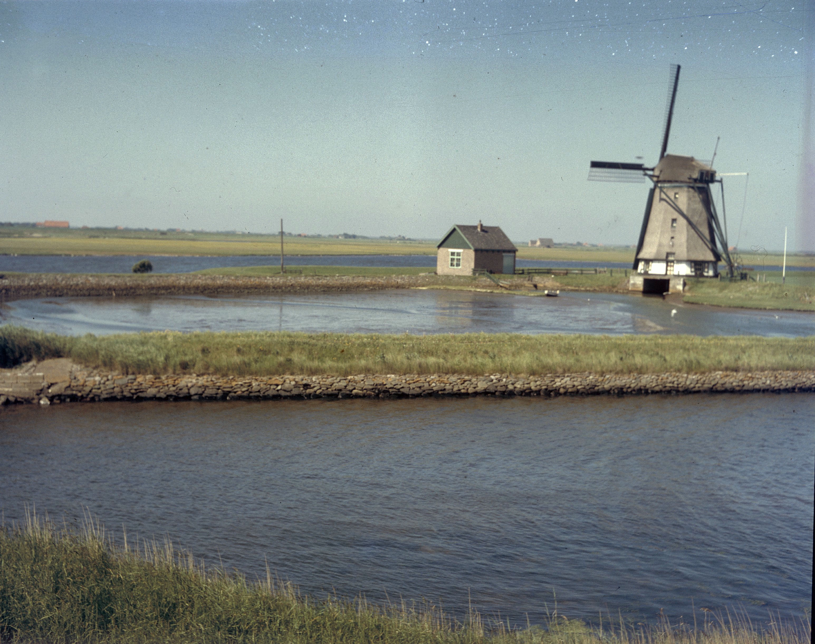 Het Noorden: Vergezicht met molen (opmerking: Diacollectie Molens)